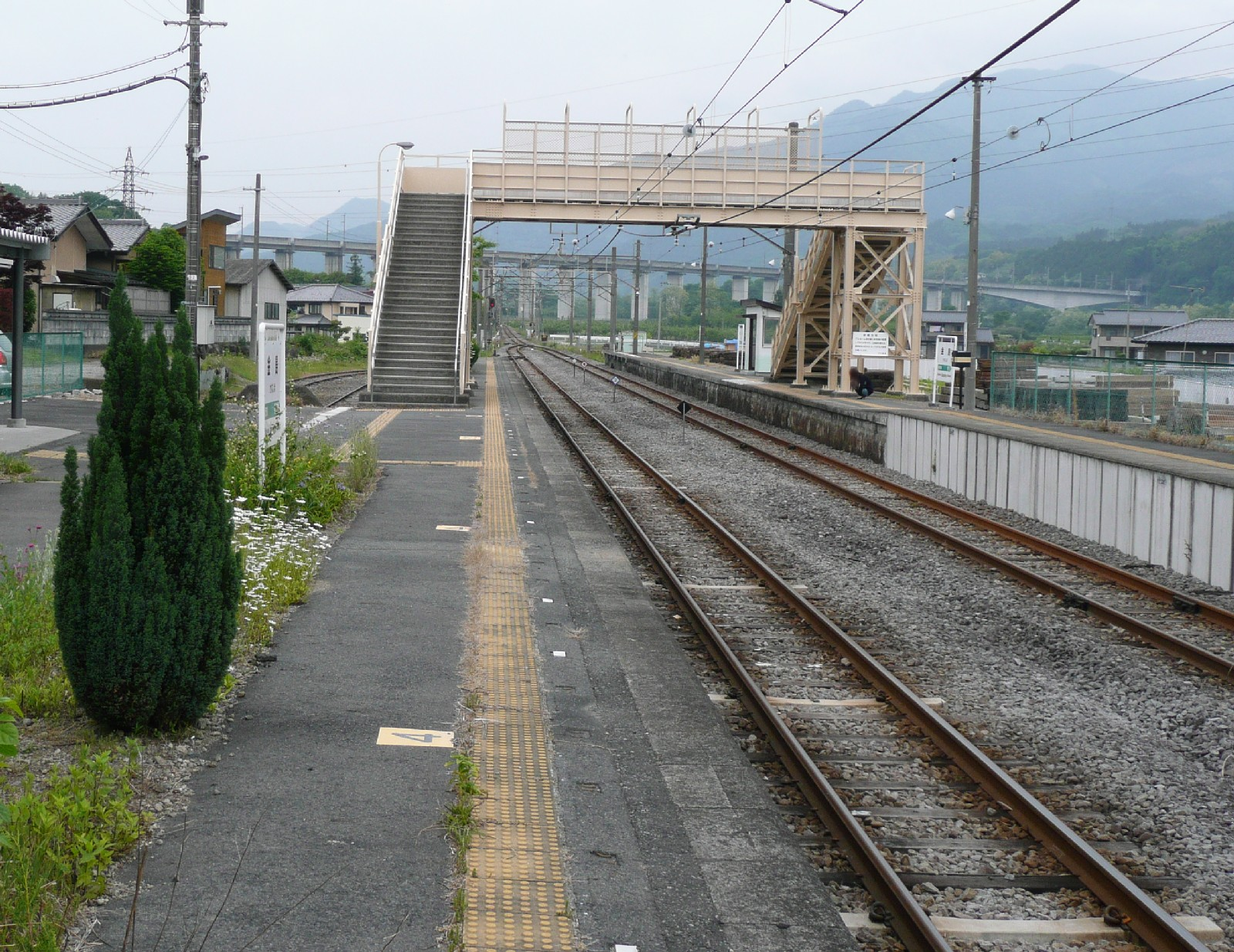 金島駅ホーム